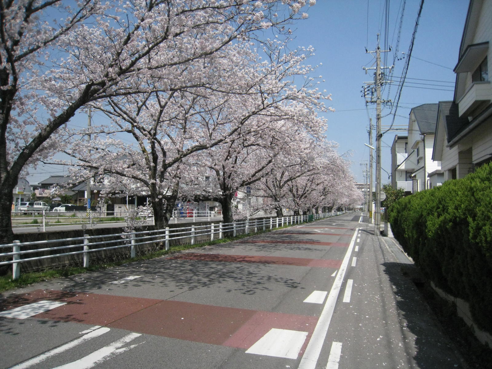 岡崎市薮田。早川の桜並木